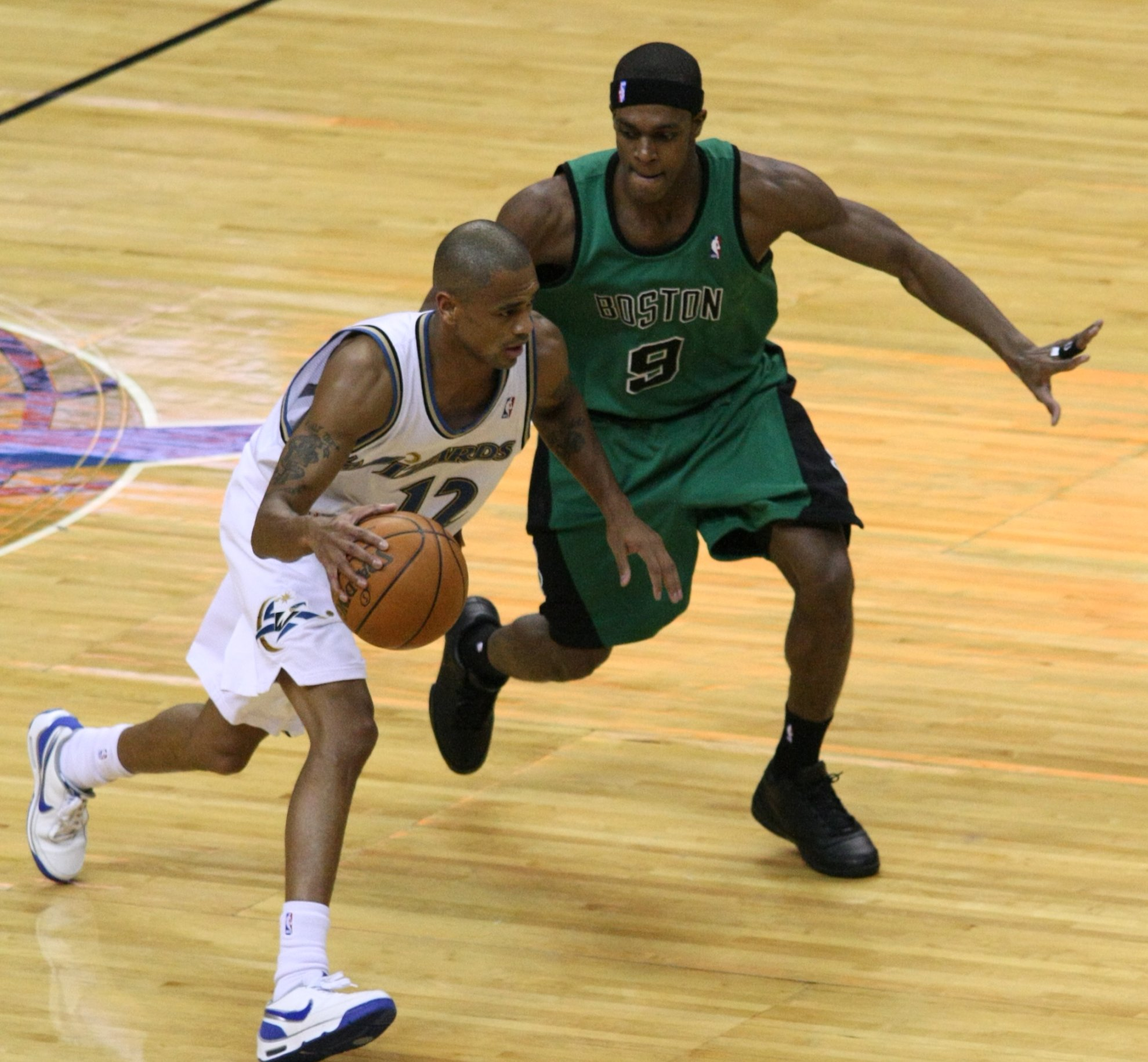 Rajon Rondo defending Juan Dixon